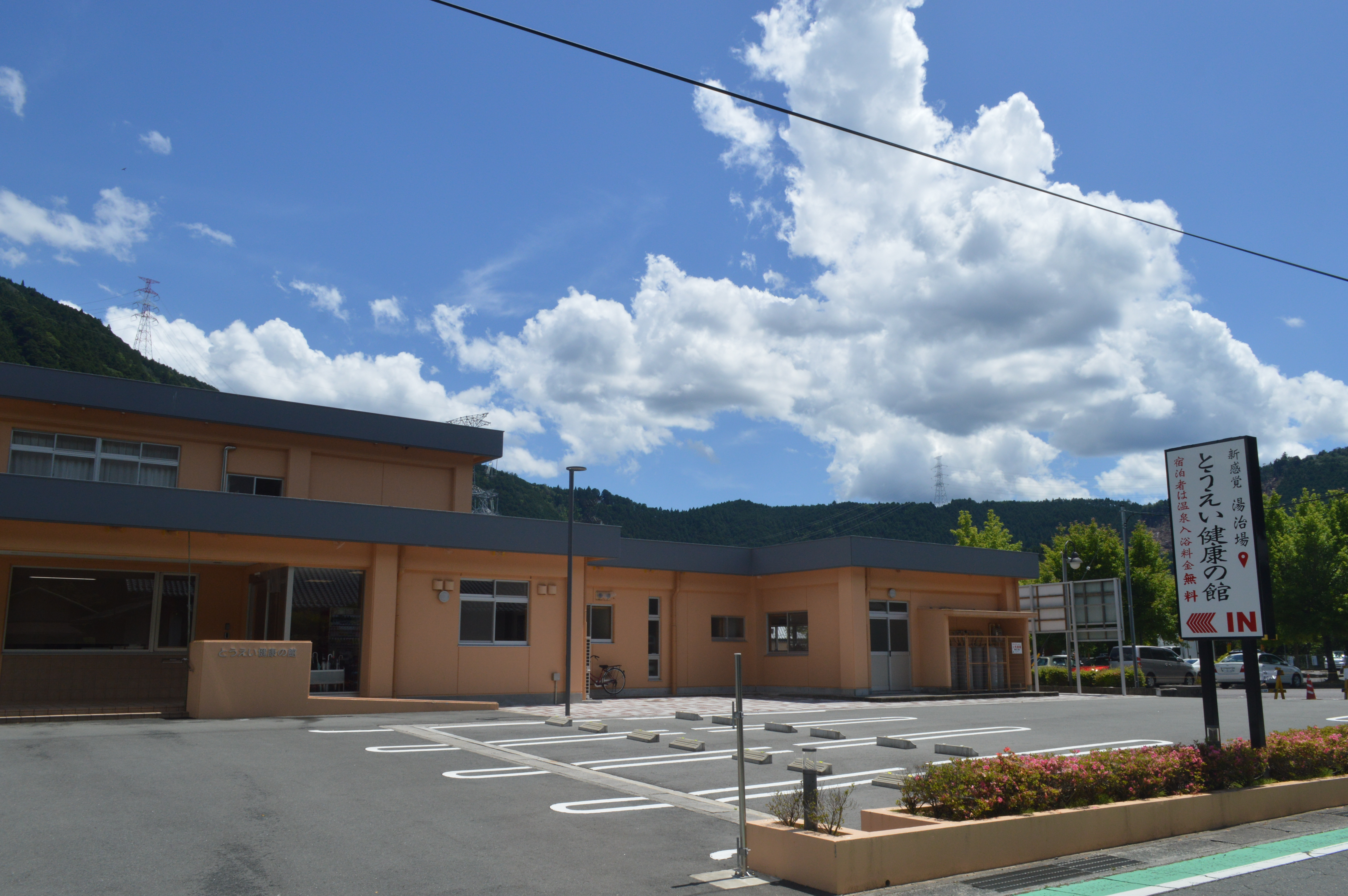 愛知県北設楽郡東栄町にある「とうえい健康の館」。